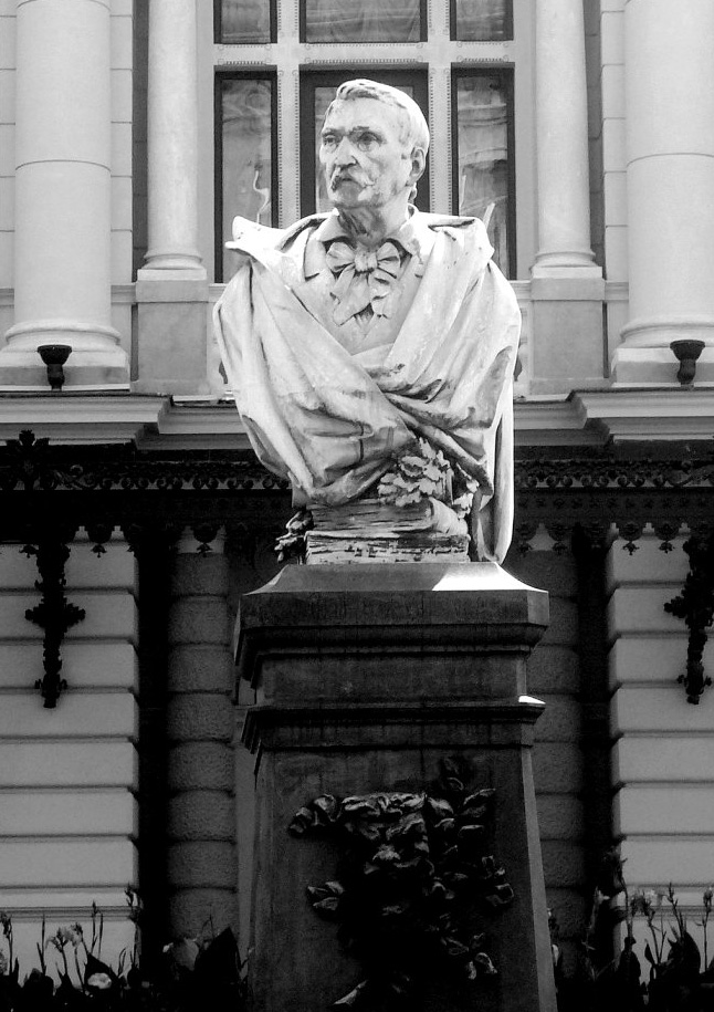 Aleksander Fredro's monument in Krakow, by Cyprian Godebski